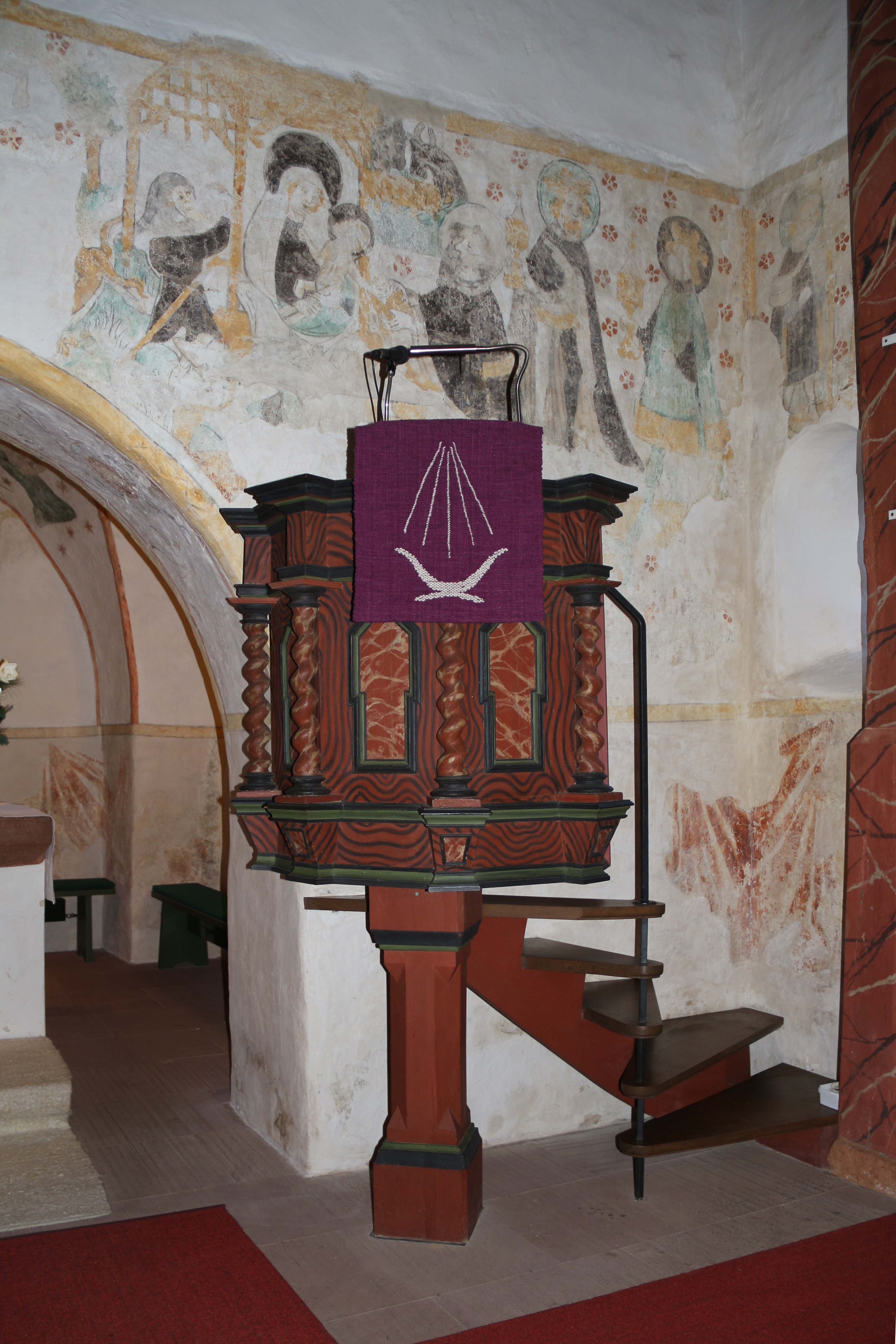 Kirche